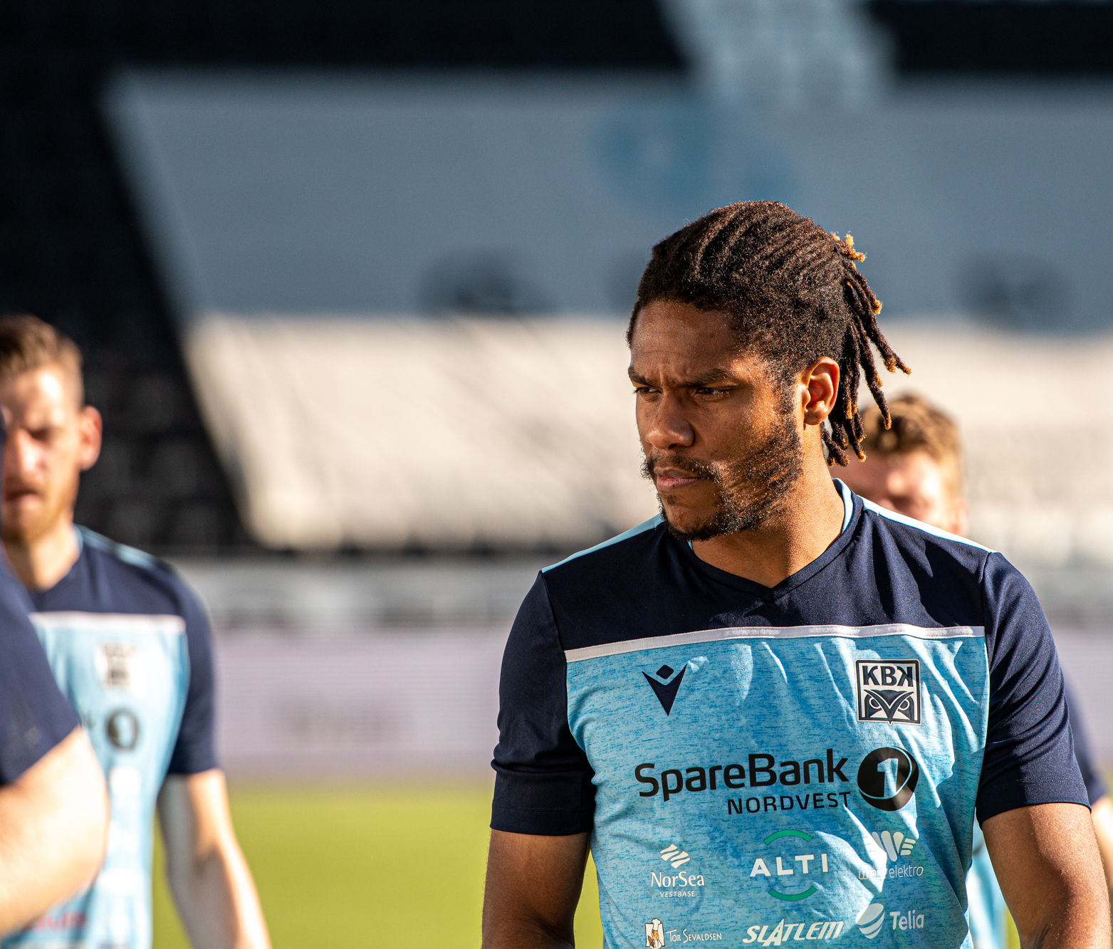 Psyche Foto Bjørn-Christian Roksvåg